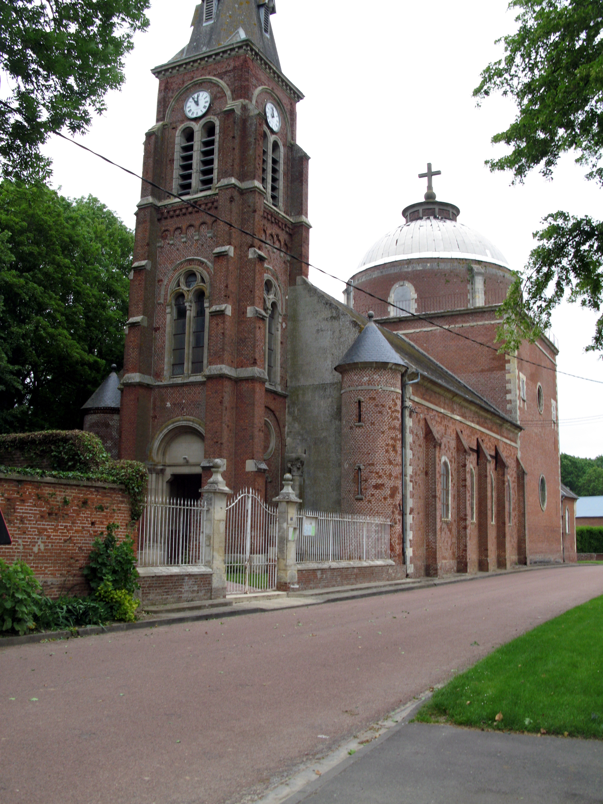 Grivesnes (Somme, France) - L'église avec son dôme, si particulier dans la région.